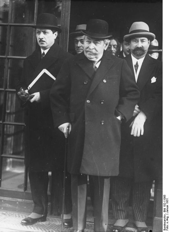 Die ersten Aufnahmen der Völkerbunds-Verhandlungen über den Polen-Conflikt in Genf! Der französische Aussenminister Briand beim Verlassen des Völkerbund-Palais.